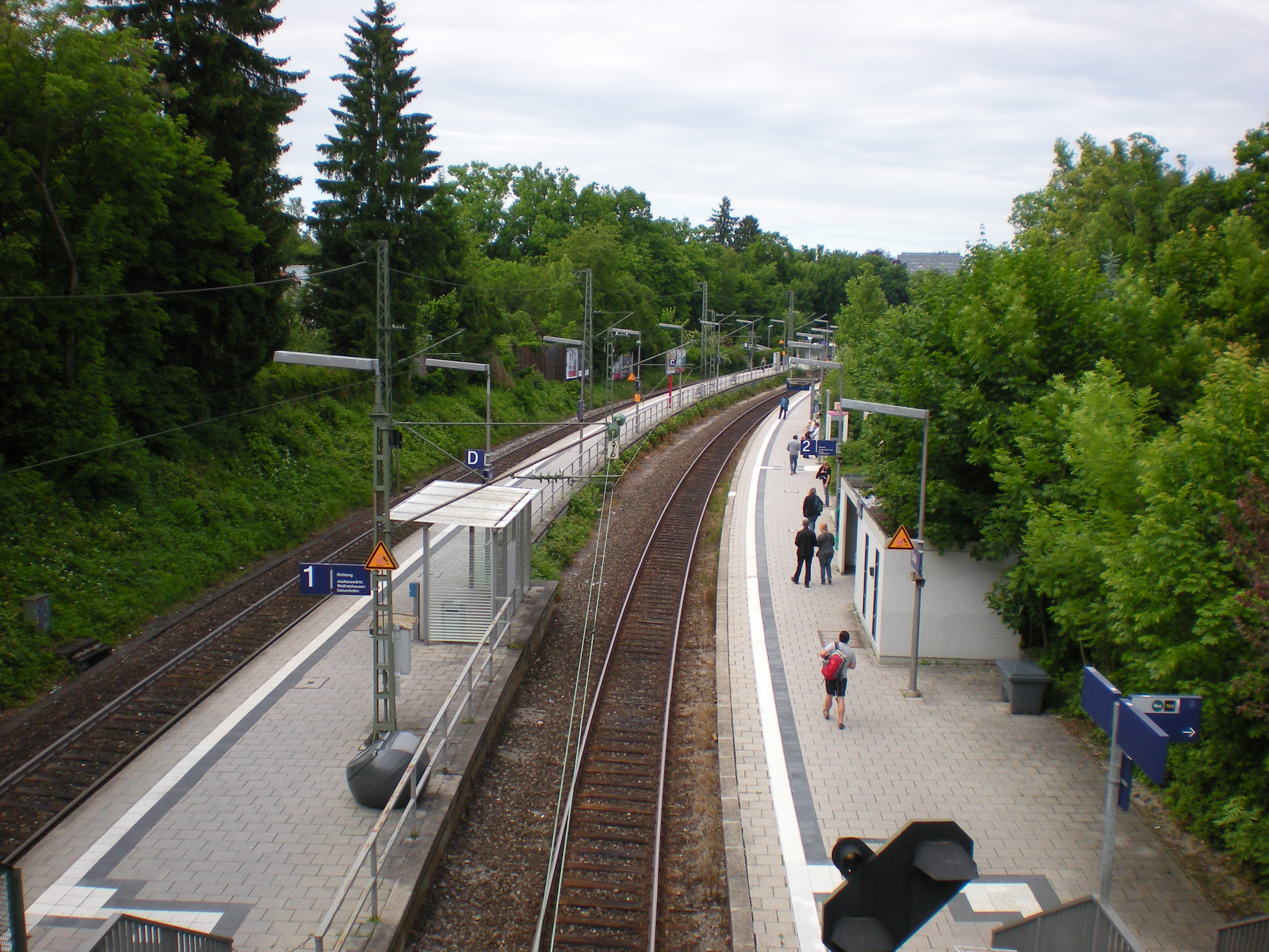 Bahnsteige des Bahnhofs München-Solln, von der Bahnhofsüberführung her gesehen